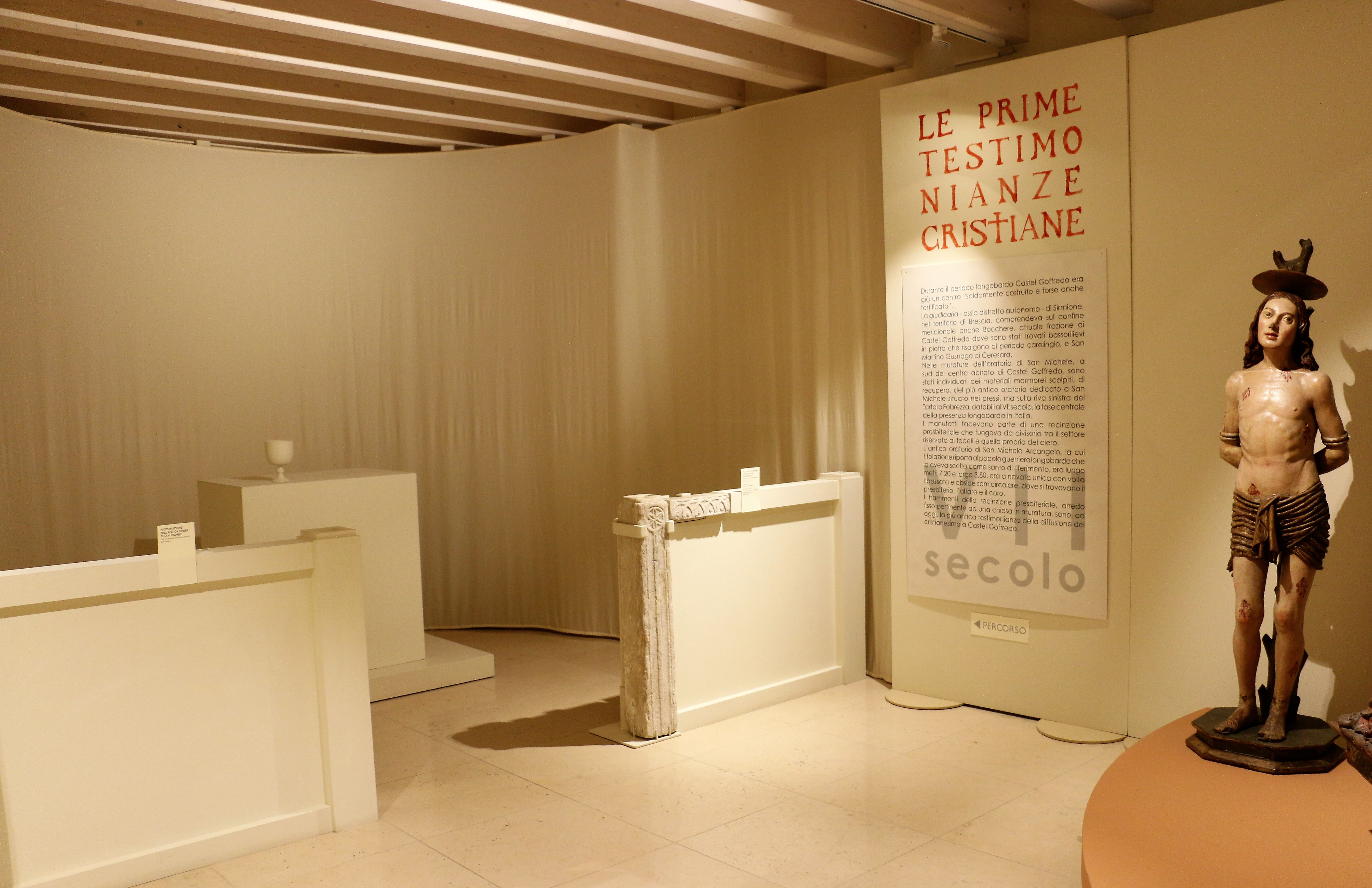 MAST Castel Goffredo-Le prime testimonianze cristiane